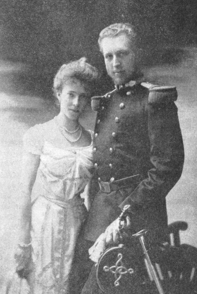 Albert I. von Belgien mit seiner Ehefrau, Herzogin Elisabeth von Bayern